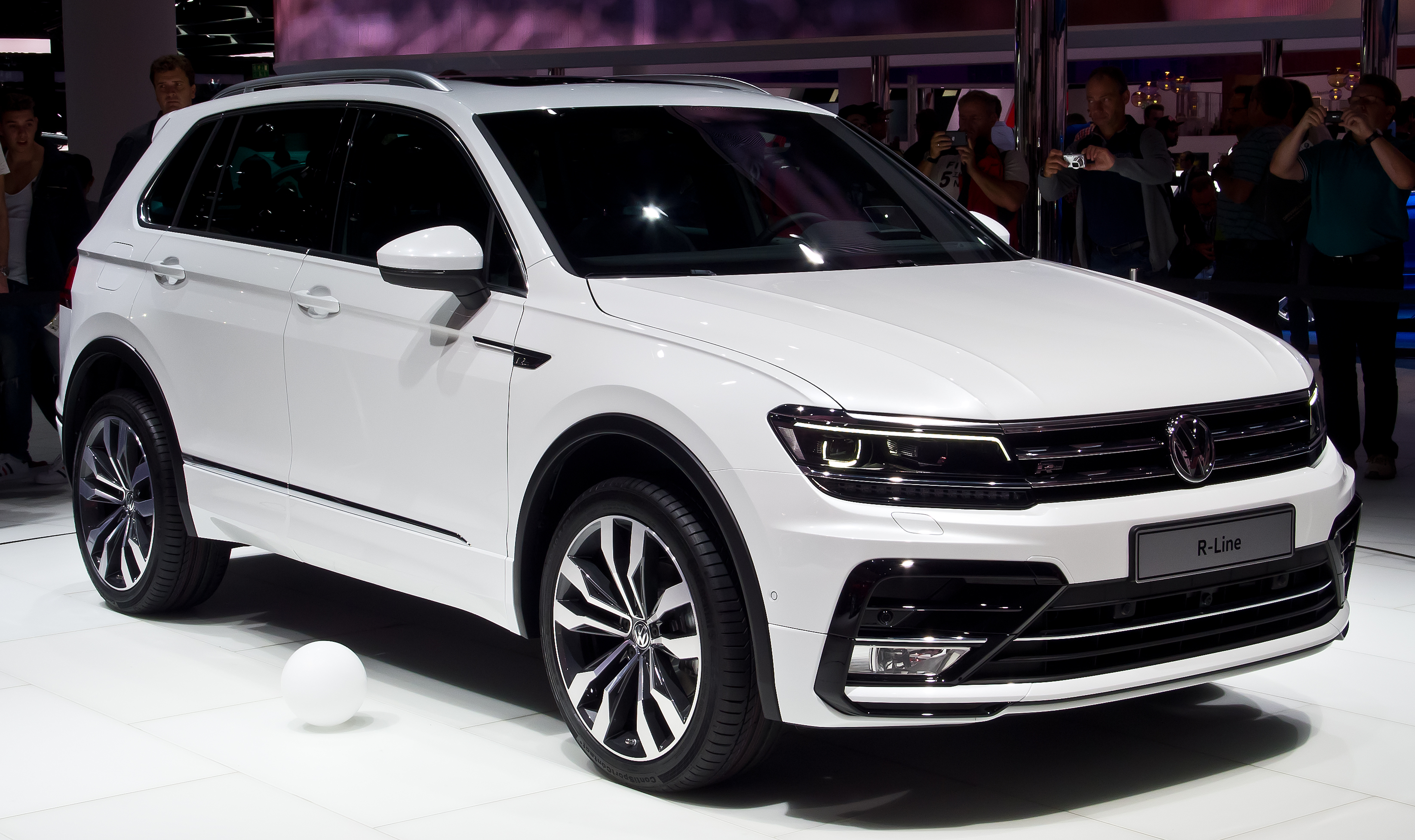 VW Tiguan 2.0 TDI 4MOTION R-Line (II)